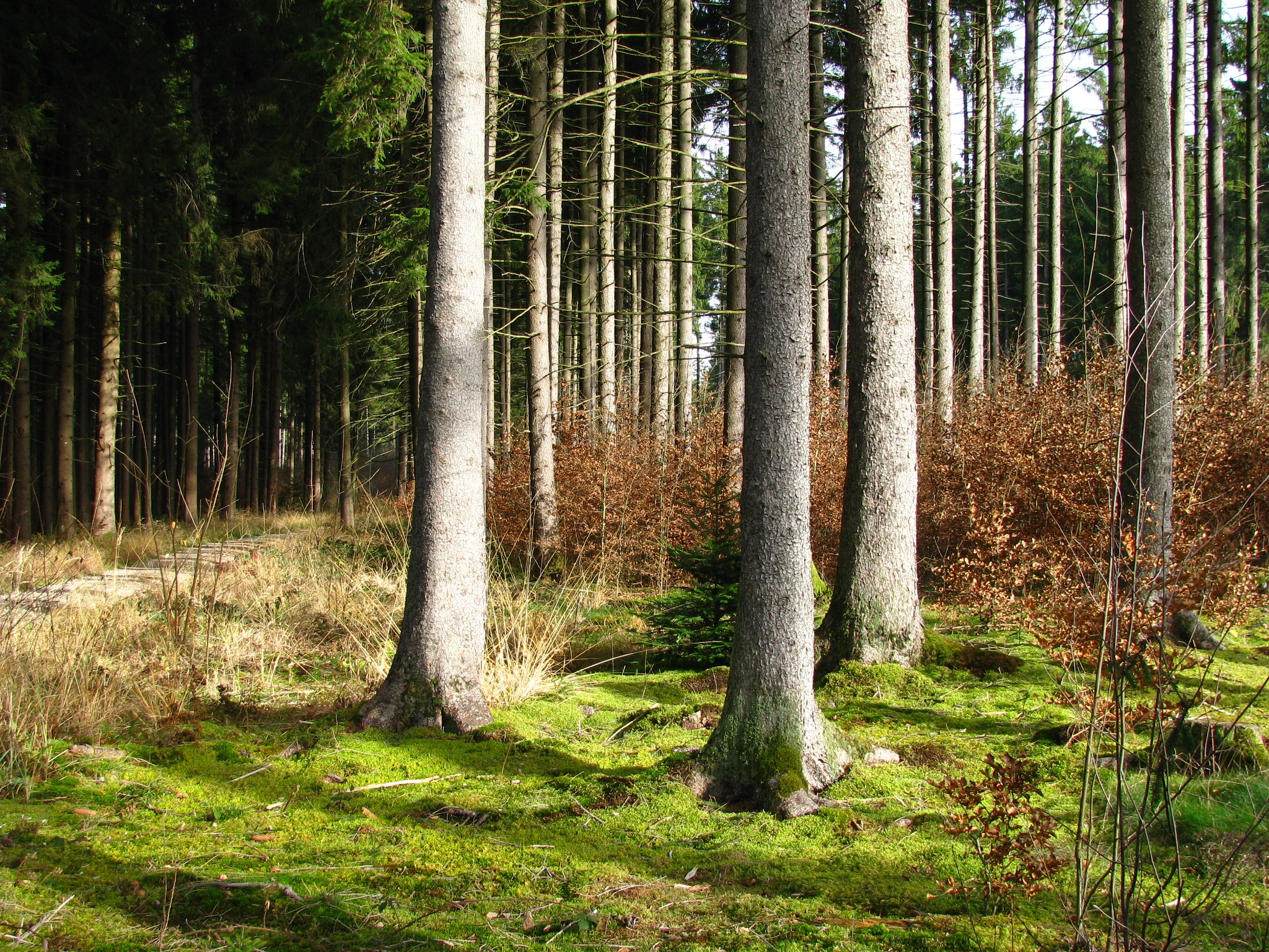 Forst Kasten im Landkreis München, Verbindungsweg vom Parkgeräumt zum Hellergeräumt nahe der Grenze zum Forstenrieder Park, Richtung nordost